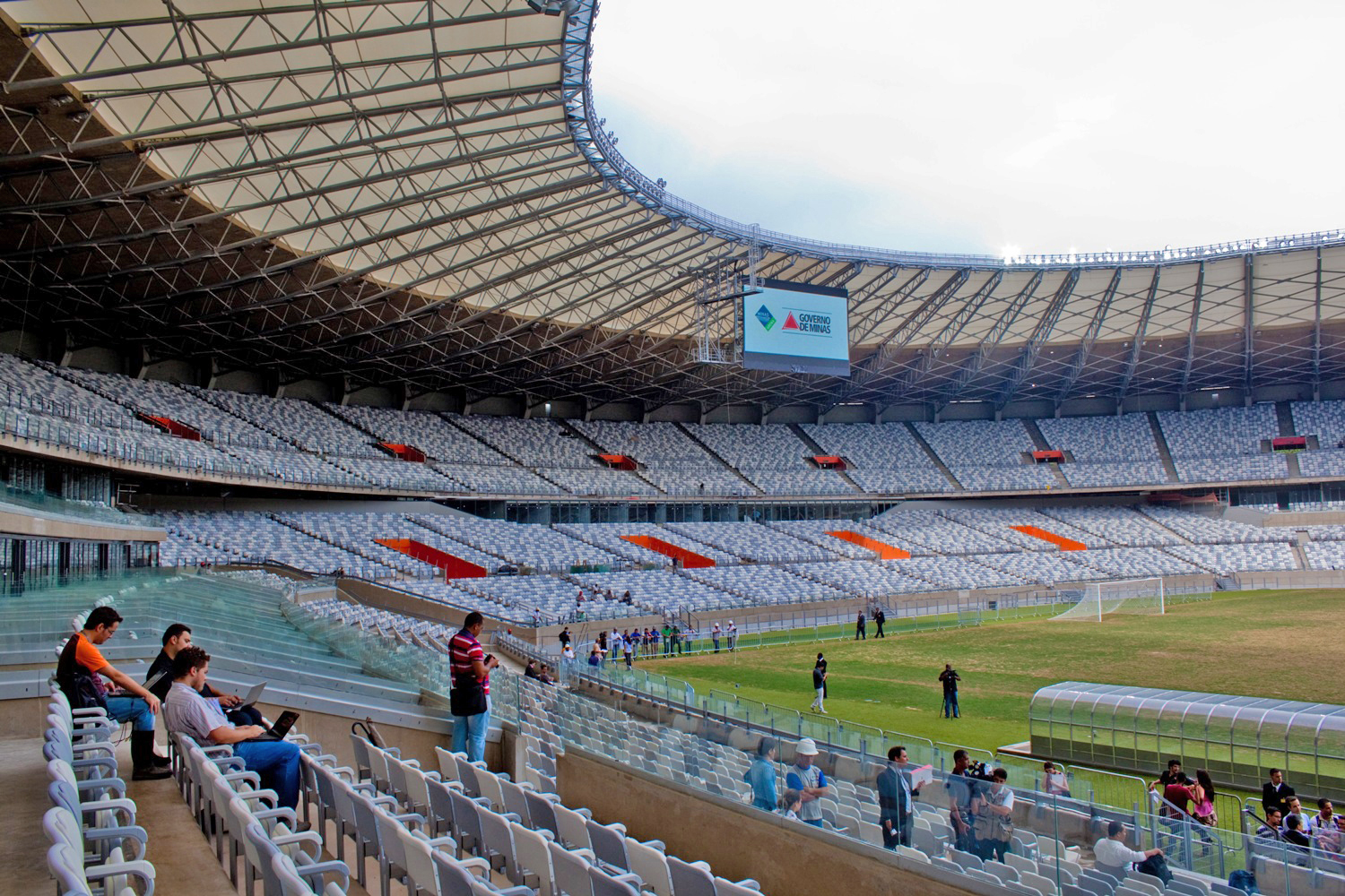 Estádio do Mineirão (placar eletrônico) durante última vistoria oficial em Dezembro de 2012.